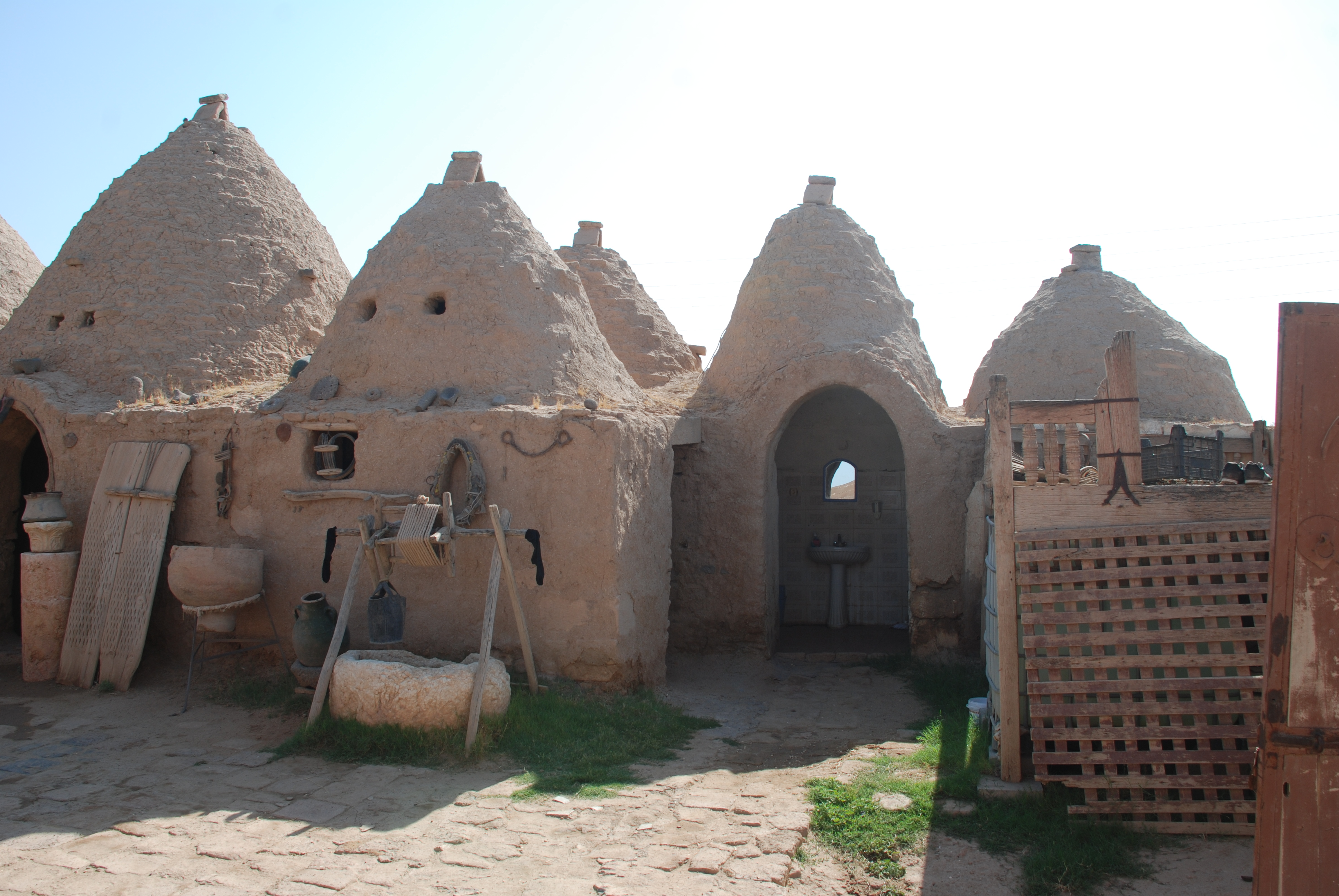 Harran kubbe evleri